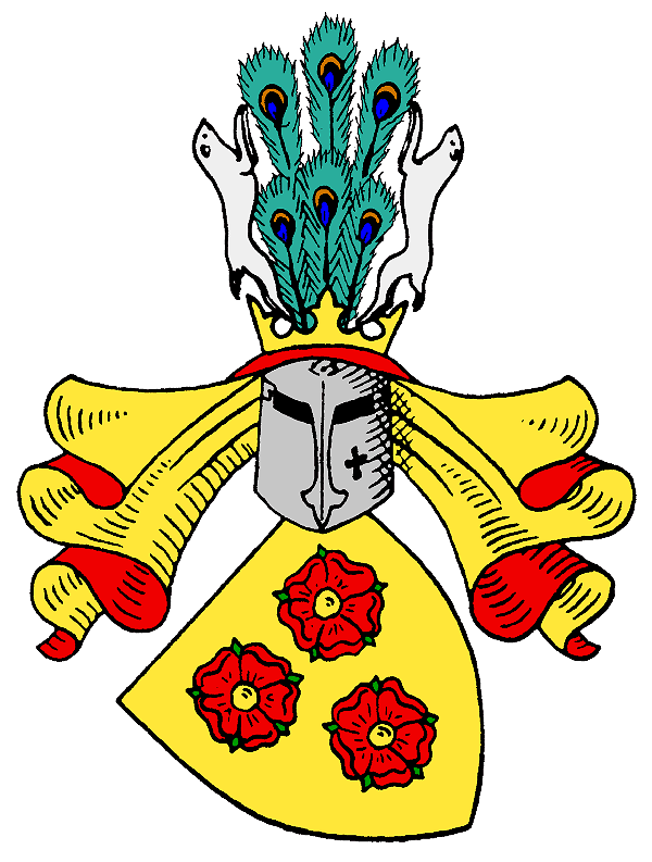 Wappen derer von Rosen